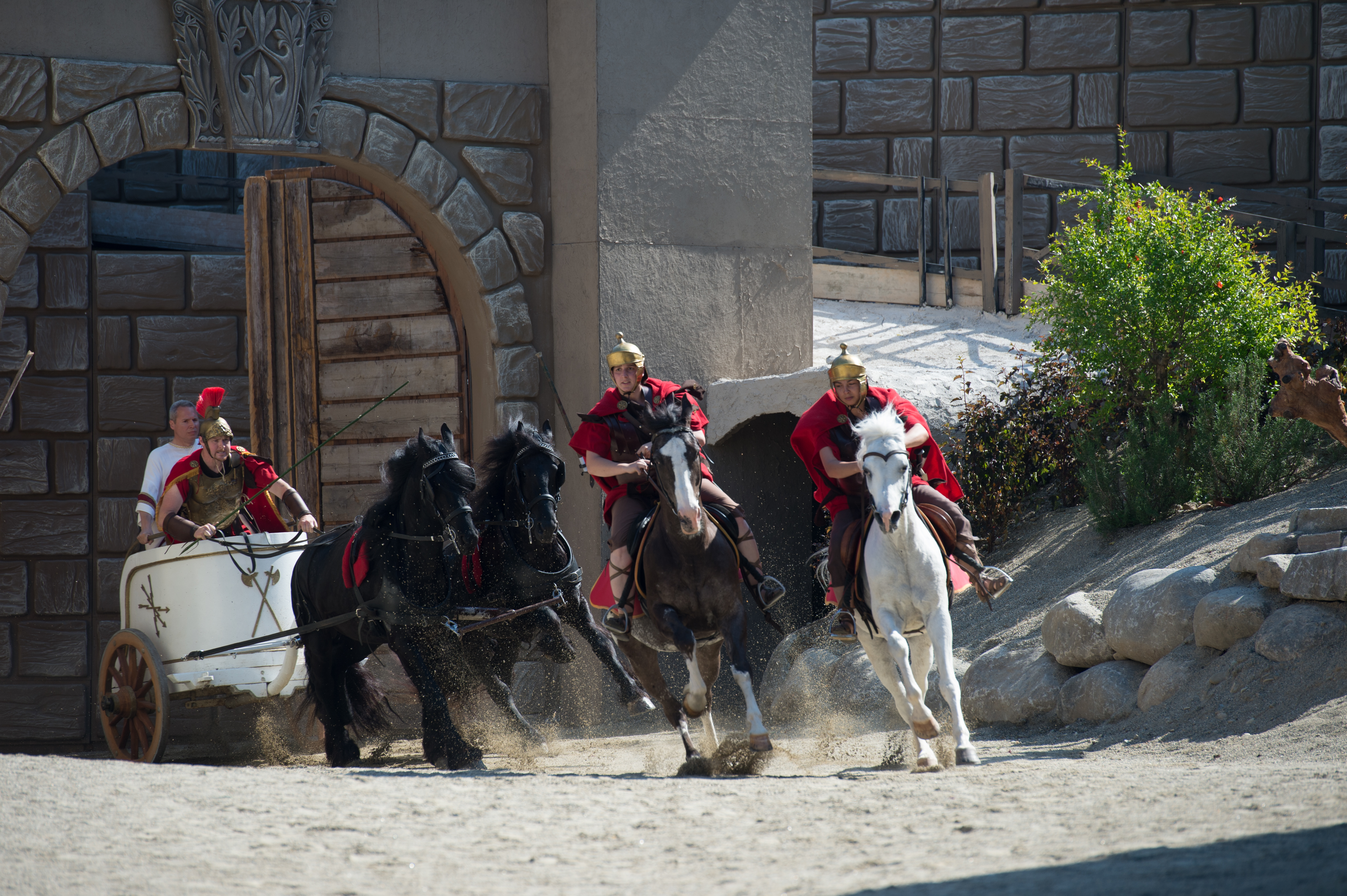 uno degli spettacoli di teatro popolare più grandi d'europa